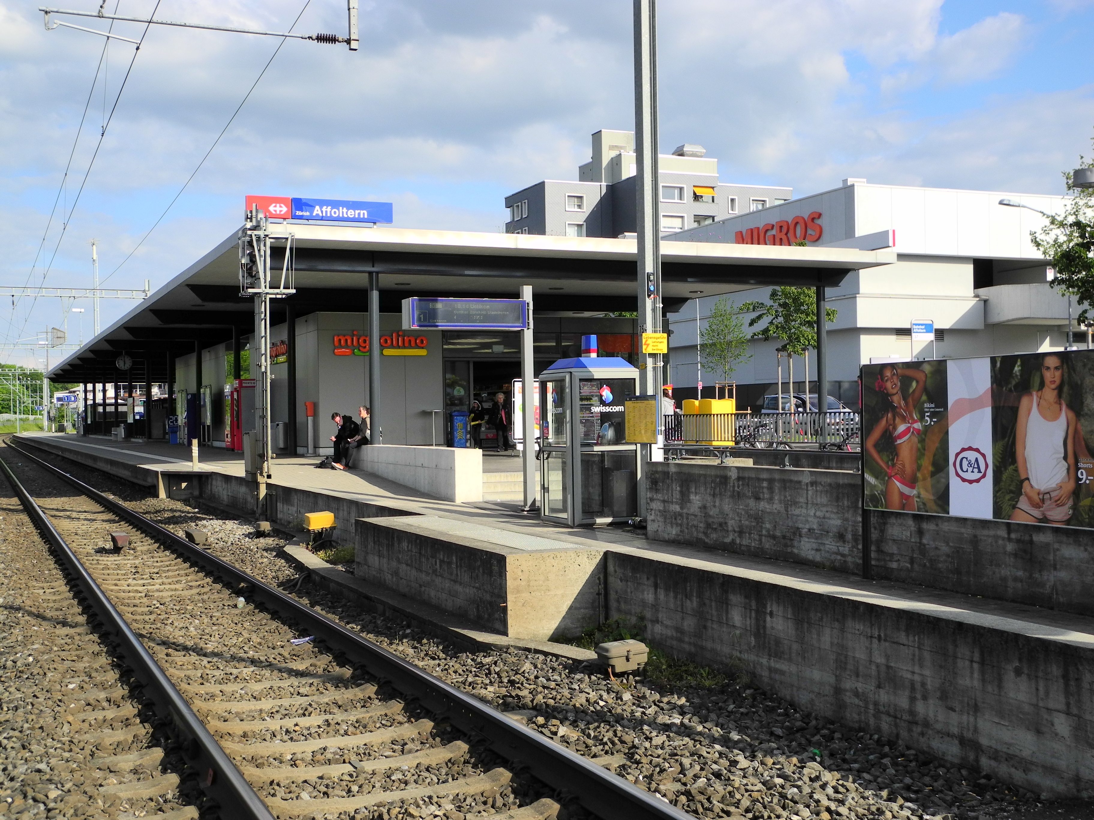 Migrolino, Bahnhof in Zürich-Unteraffoltern (Switzerland)